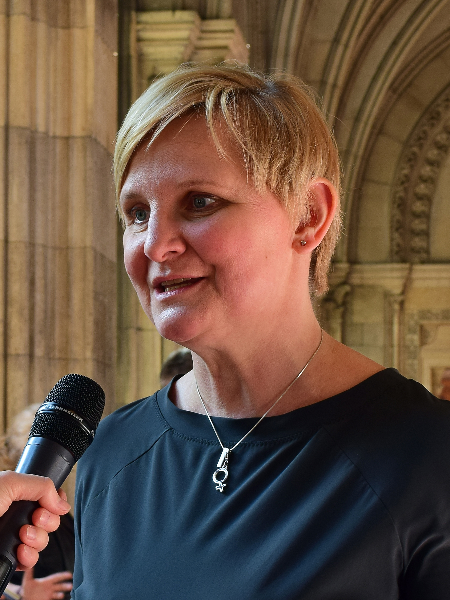 Wiens Frauenstadträtin Sandra Frauenberger bei der Aktion "Offenes Rathaus für alle Frauen und Mädchen" am 9. März 2015